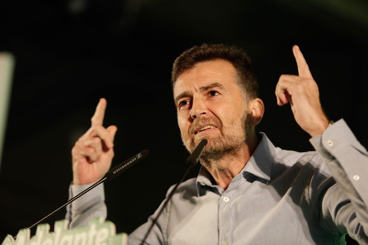 Antonio Maíllo participa en un mitin de la campaña a las elecciones autonómicas de Andalucía de 2018